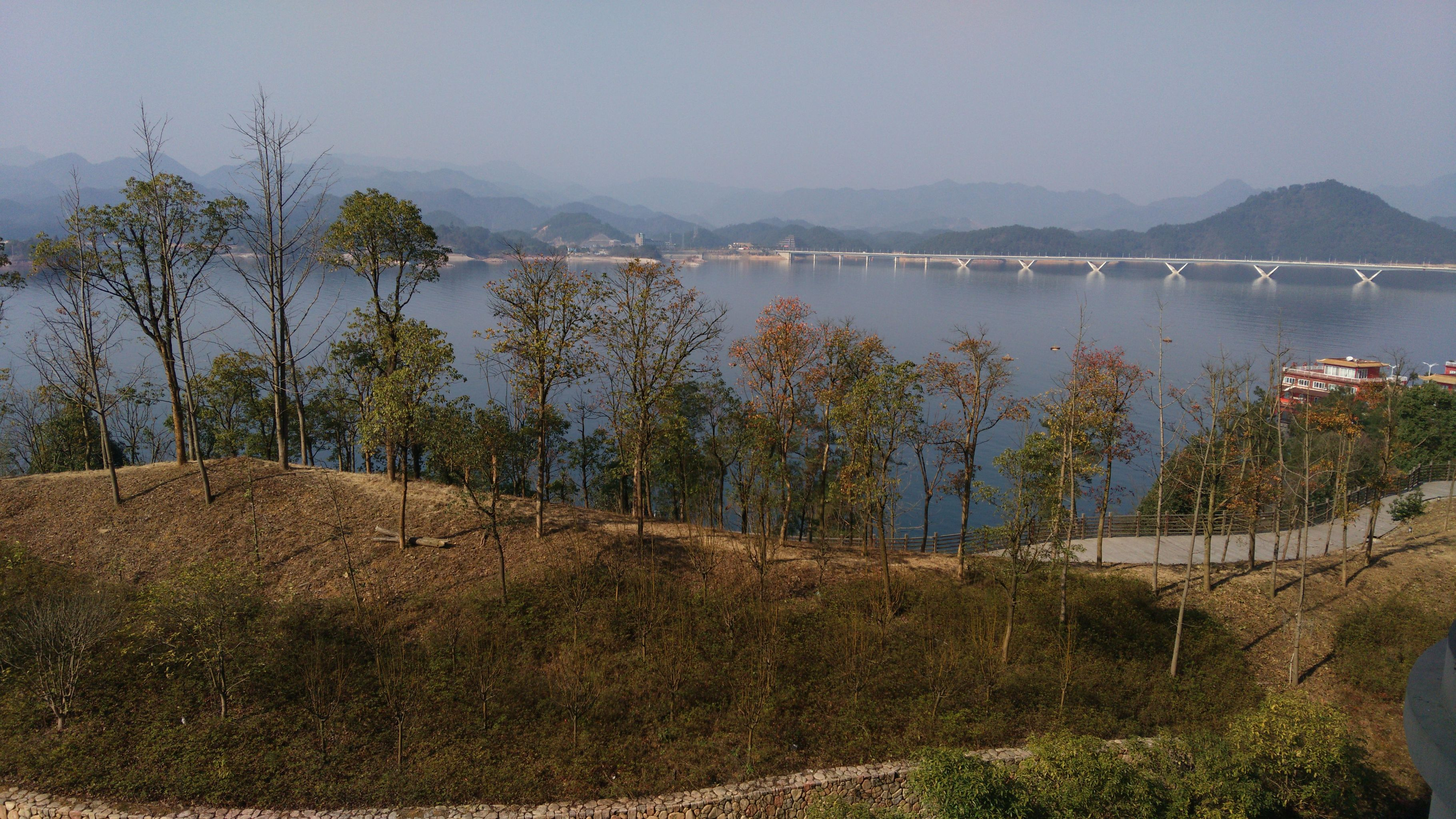 Tonglu, Hangzhou, Zhejiang, China